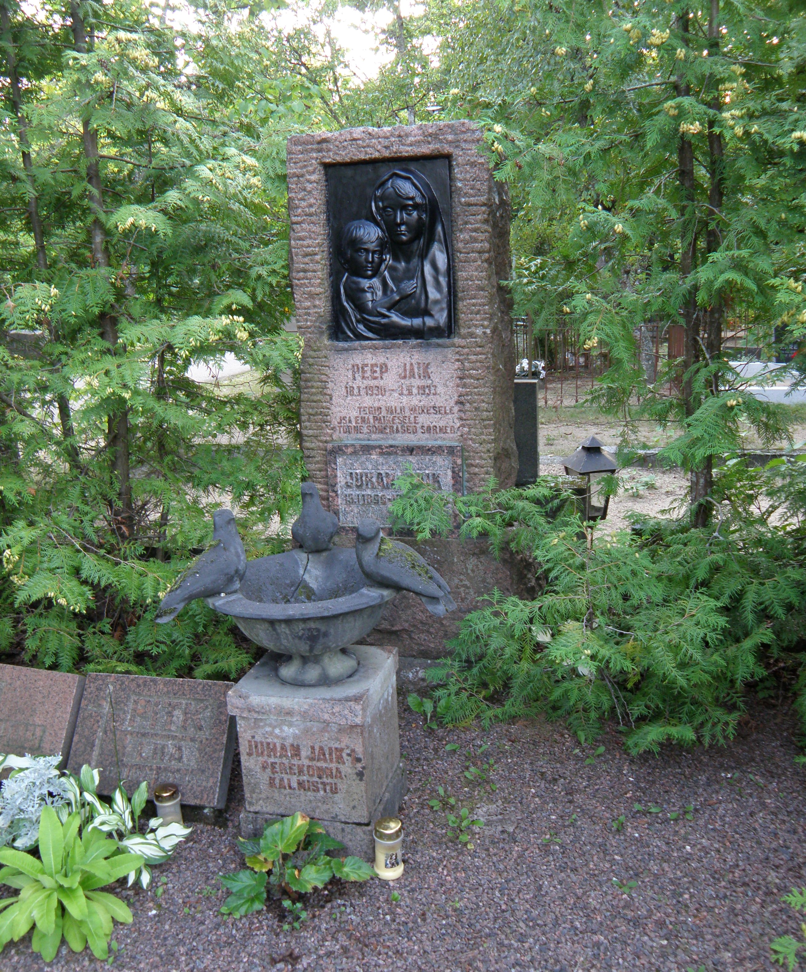 Perekond Jaigi hauasammas